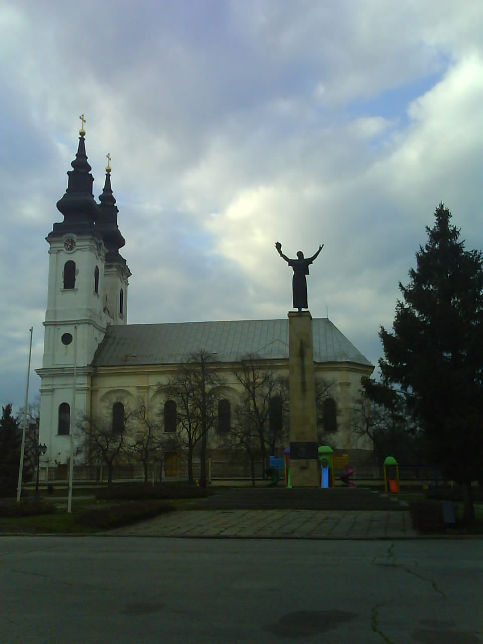 Centat Srbobrana